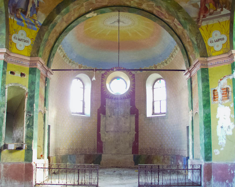 Wnętrze cerkwi w Cieszanowie